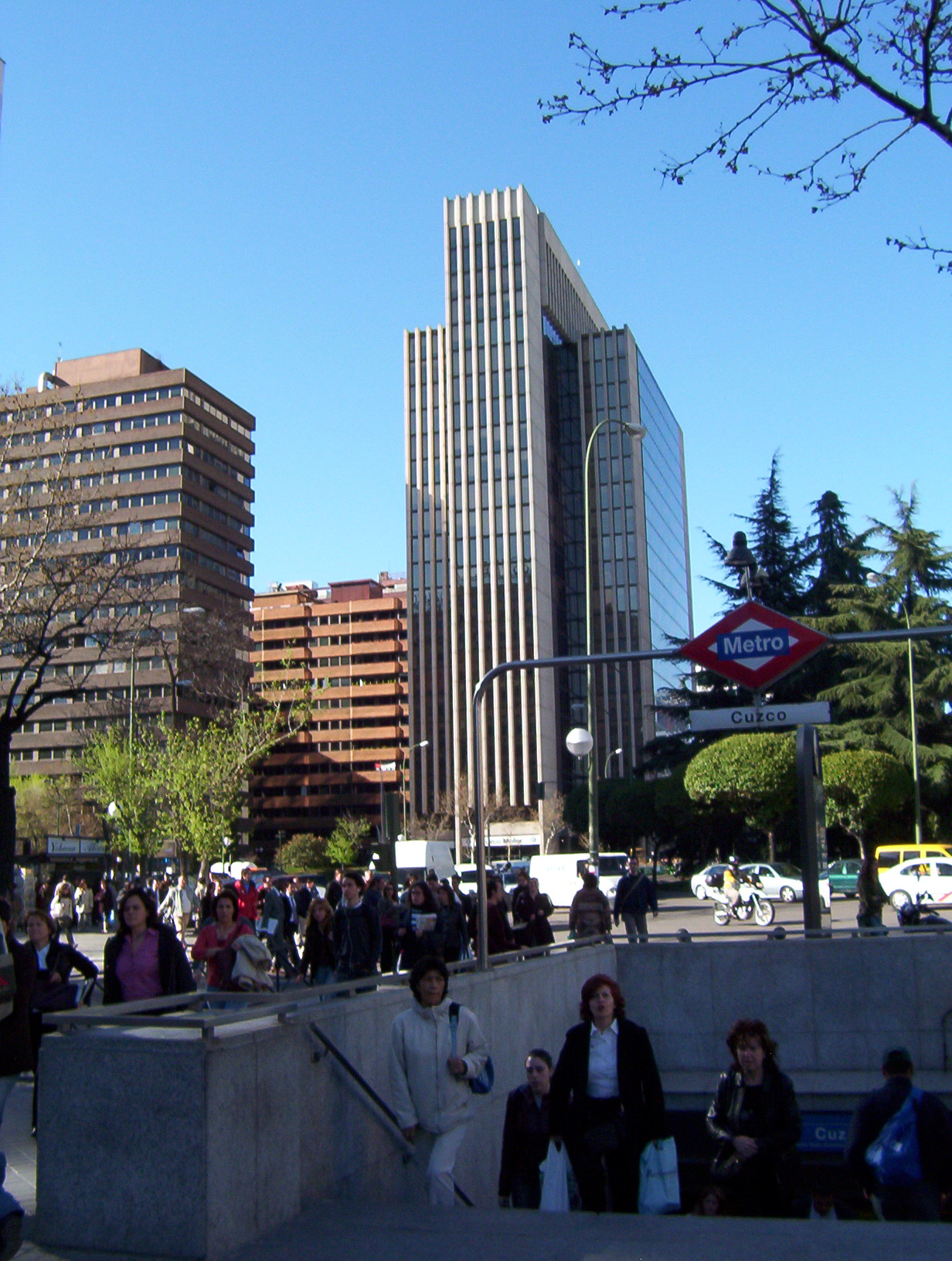 Cuzco IV